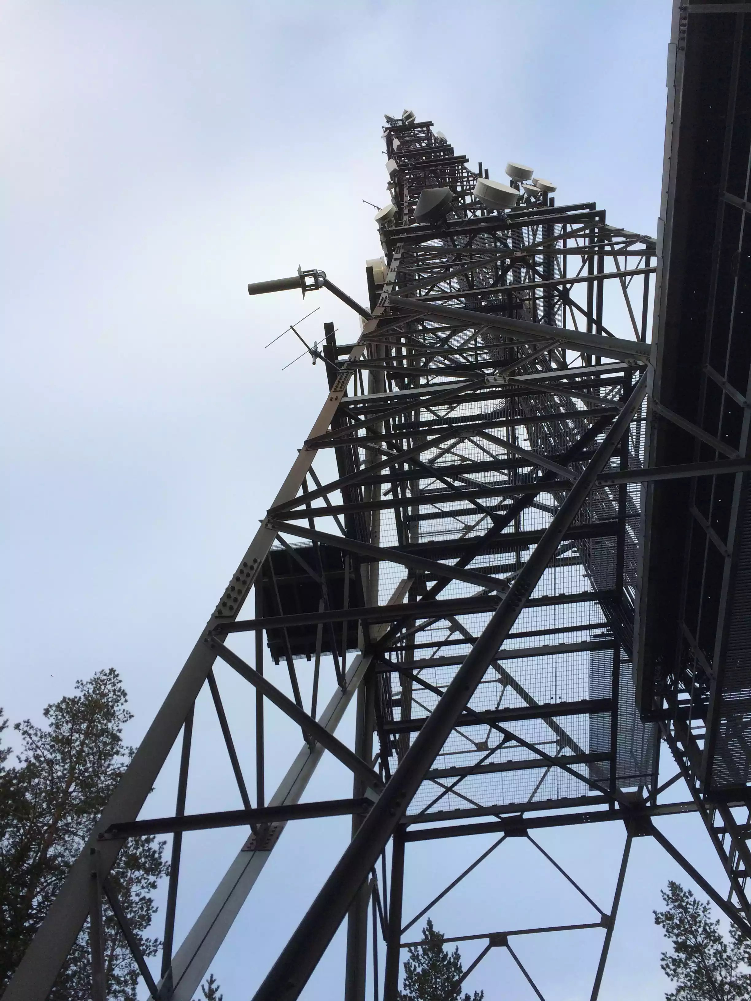 Tårnet på Runddelen i Aurskog-Høland.